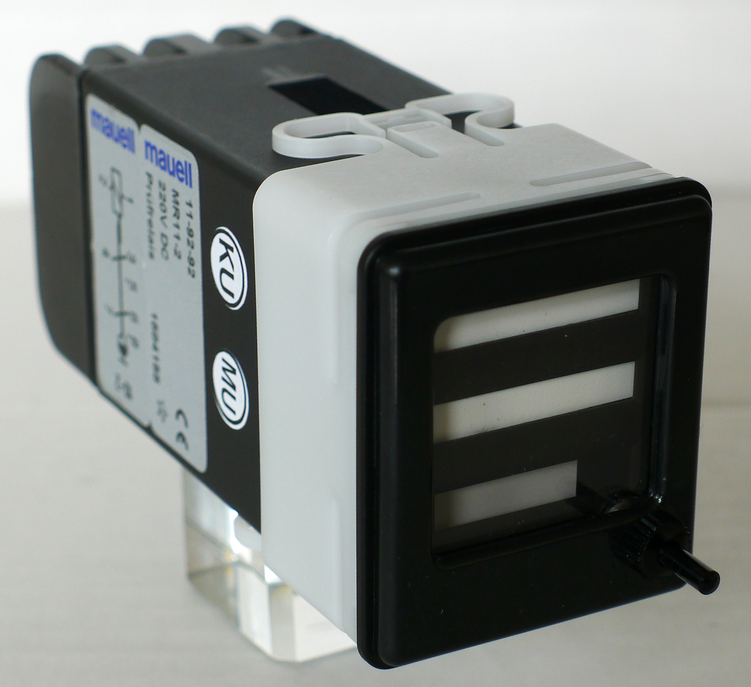 Ein Fallklappenrelais MR11 der Firma Mauell GmbH. Diese Relais werden auch als Melderelais bezeichnet.